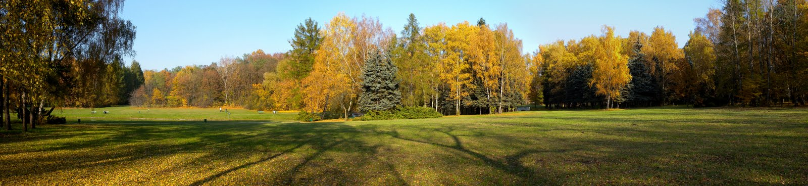 Park Piłsudskiego jesienią